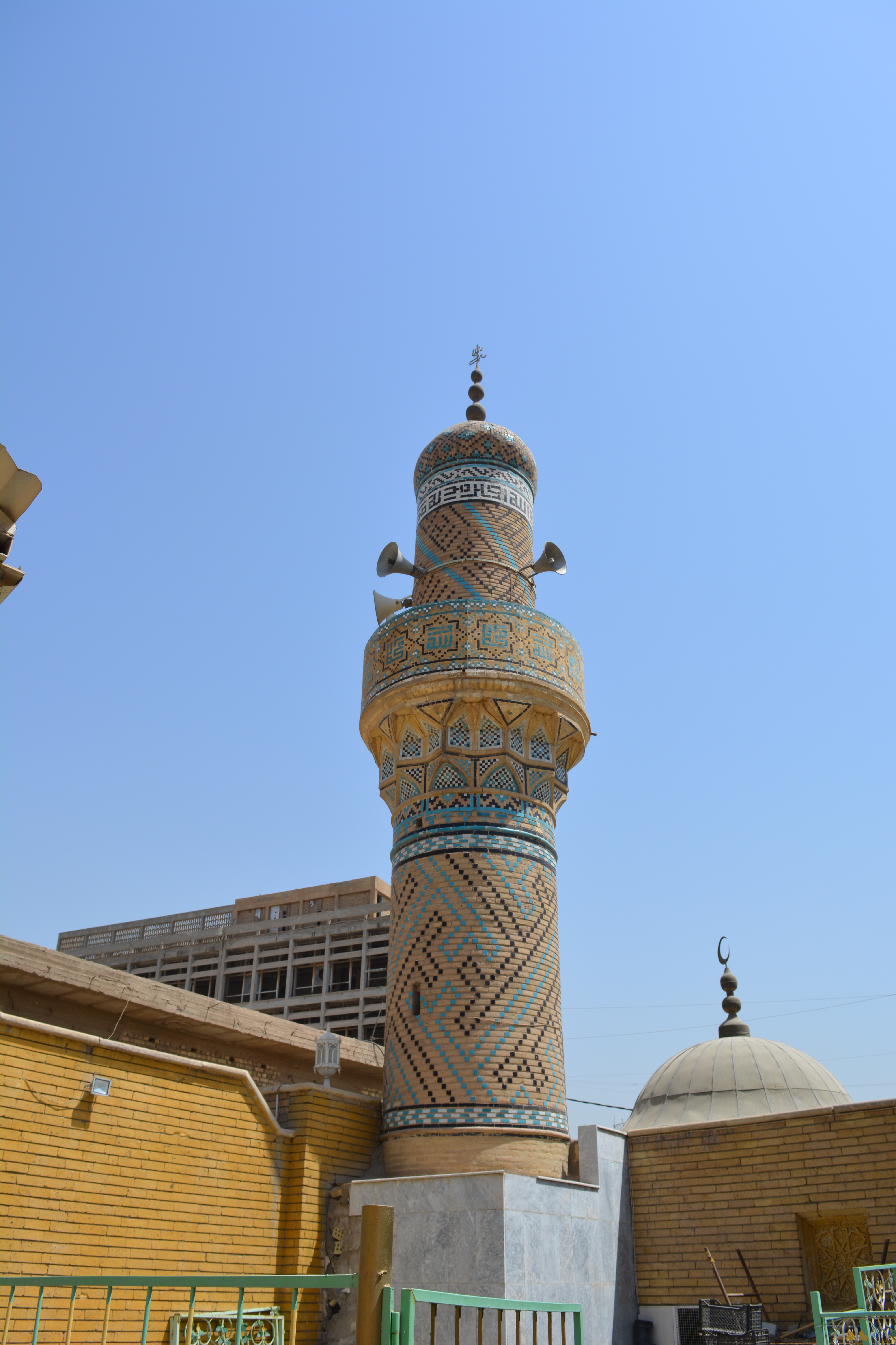 منارة جامع النعمانية والمسمى مسجد السليمانية حاليا وتظهر قبة ضريح قبر نعمان أفندي في جانب الرصافة من مدينة بغداد